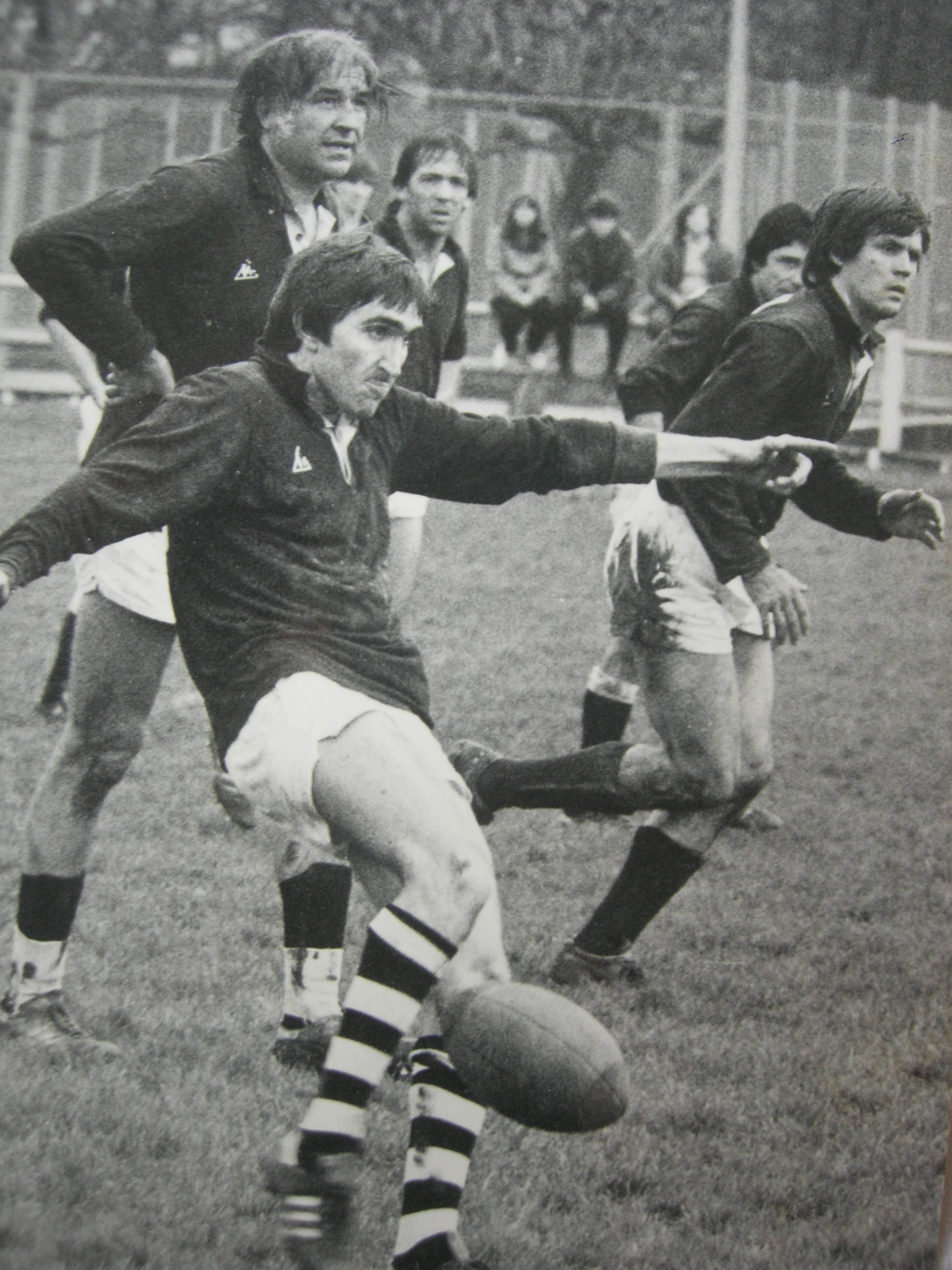 Fumel années 80